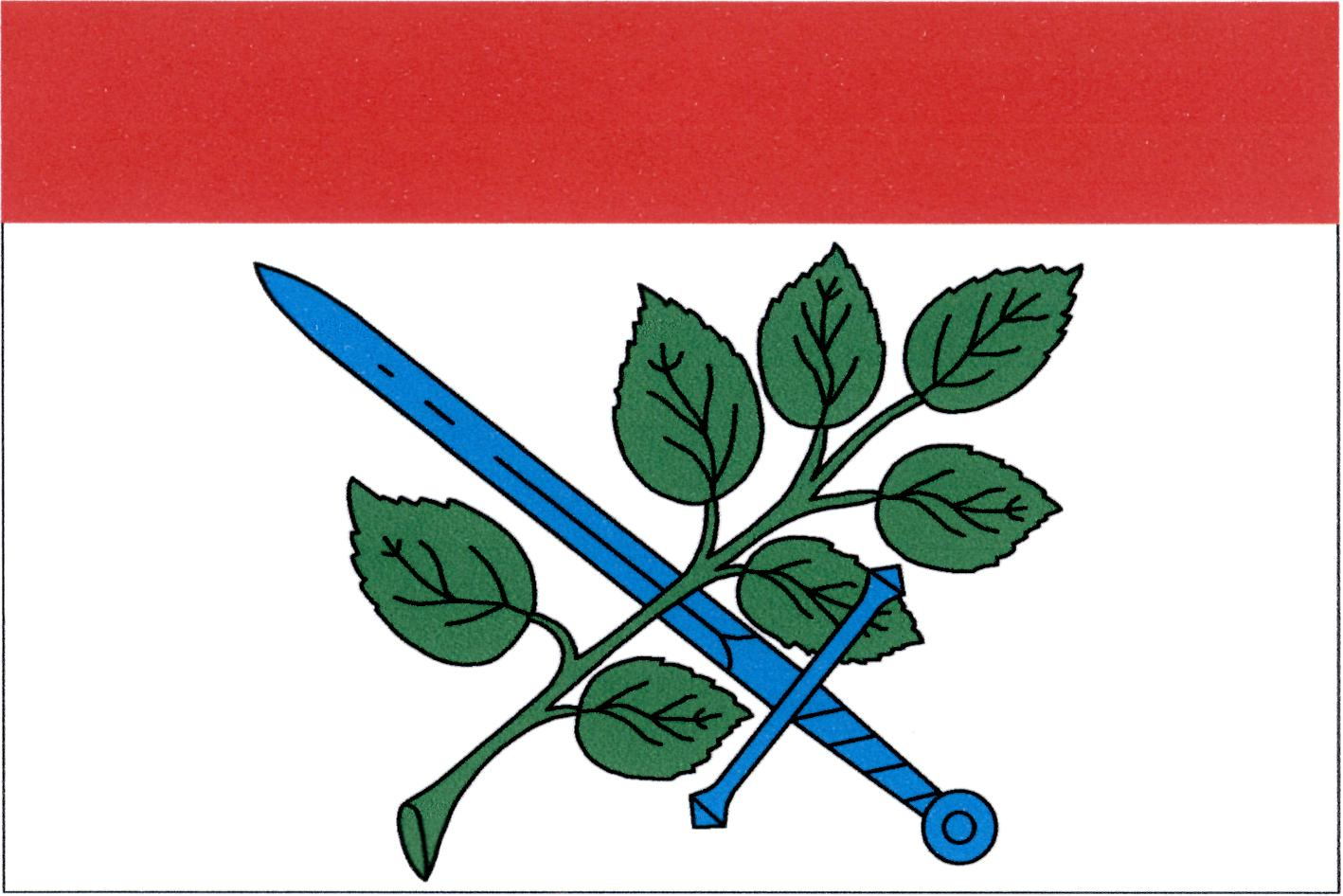 Vlajka obce Velký Malahov